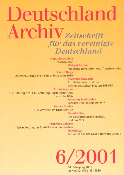 Cover des Deutschland Archivs, Heft 6, 2001.